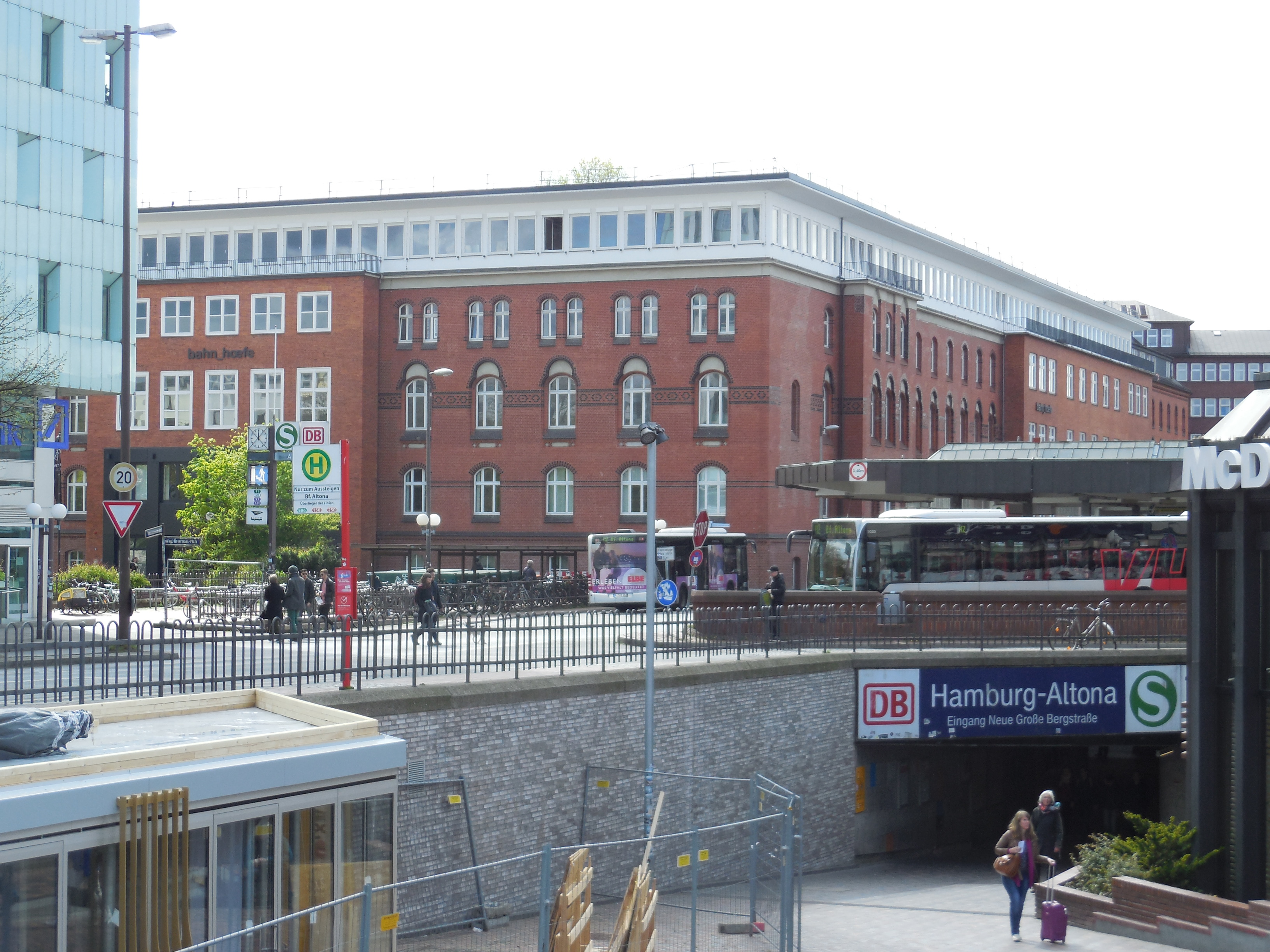 Eisenbahndirektion Altona 2015 Nordost-Ecke